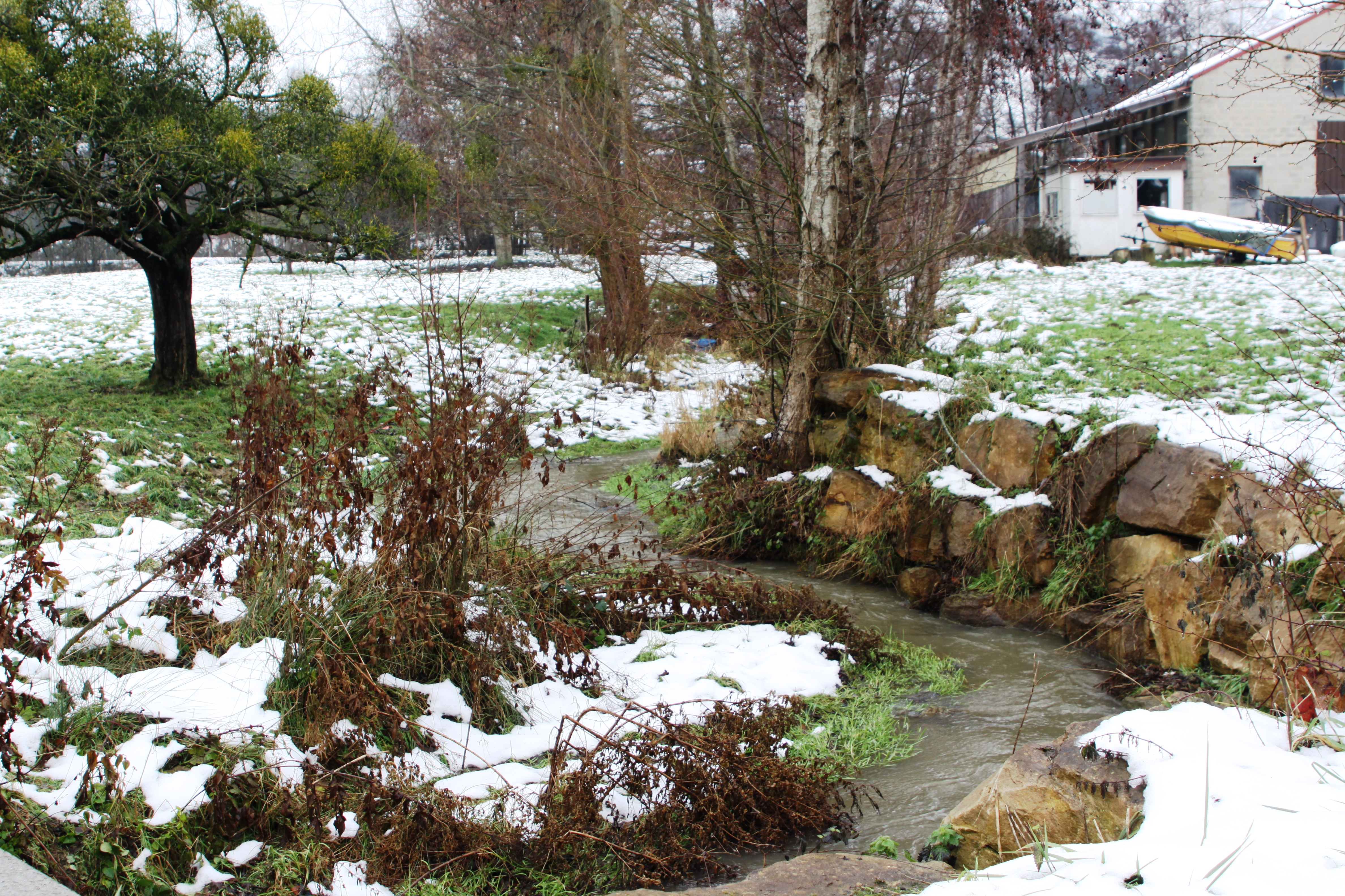 Le ruisseau de Radru à Lamorteau